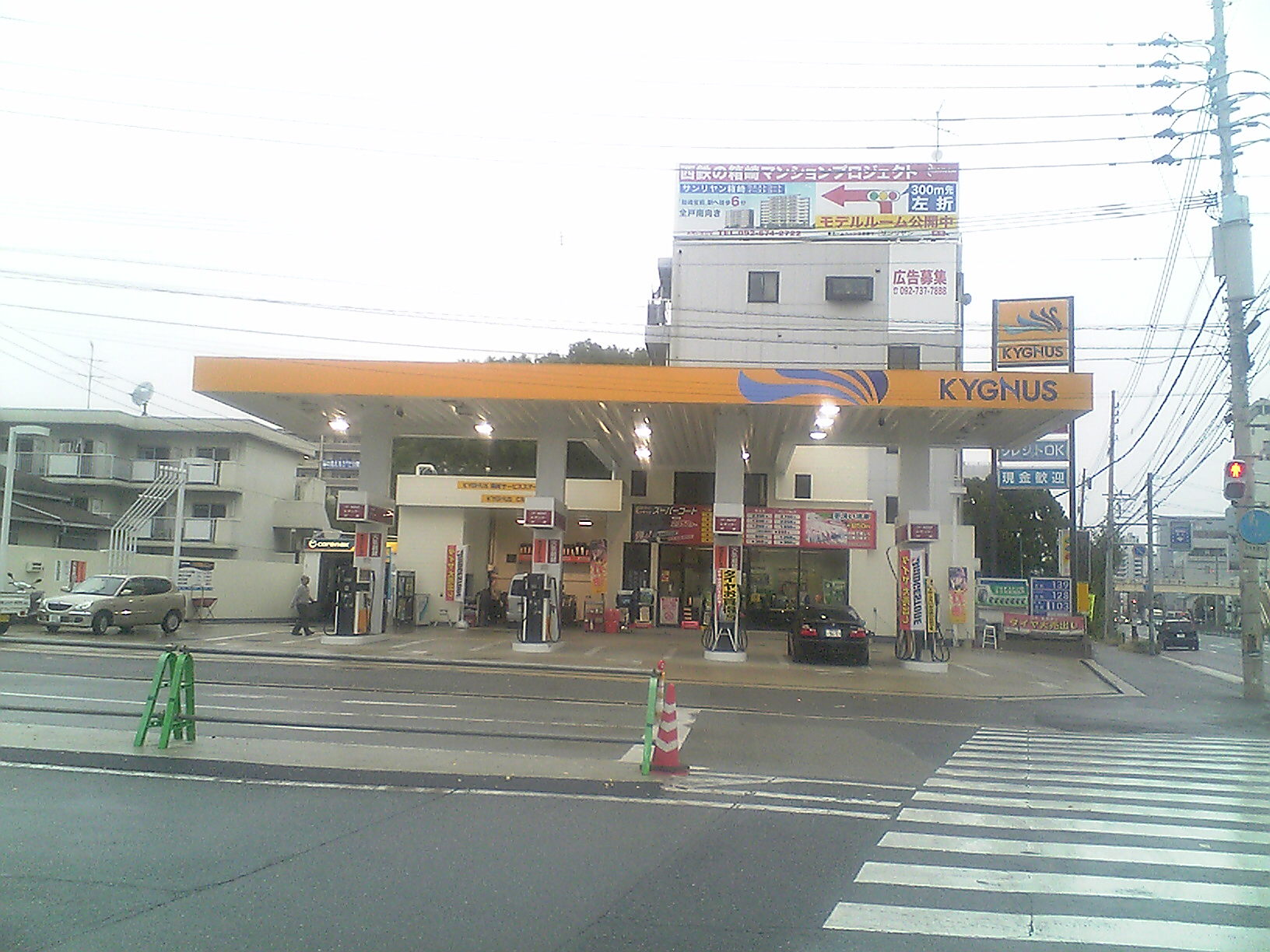 キグナス箱崎SS（福岡市東区・新SSカラー）